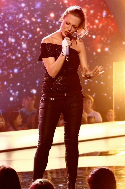 Manuella_misija